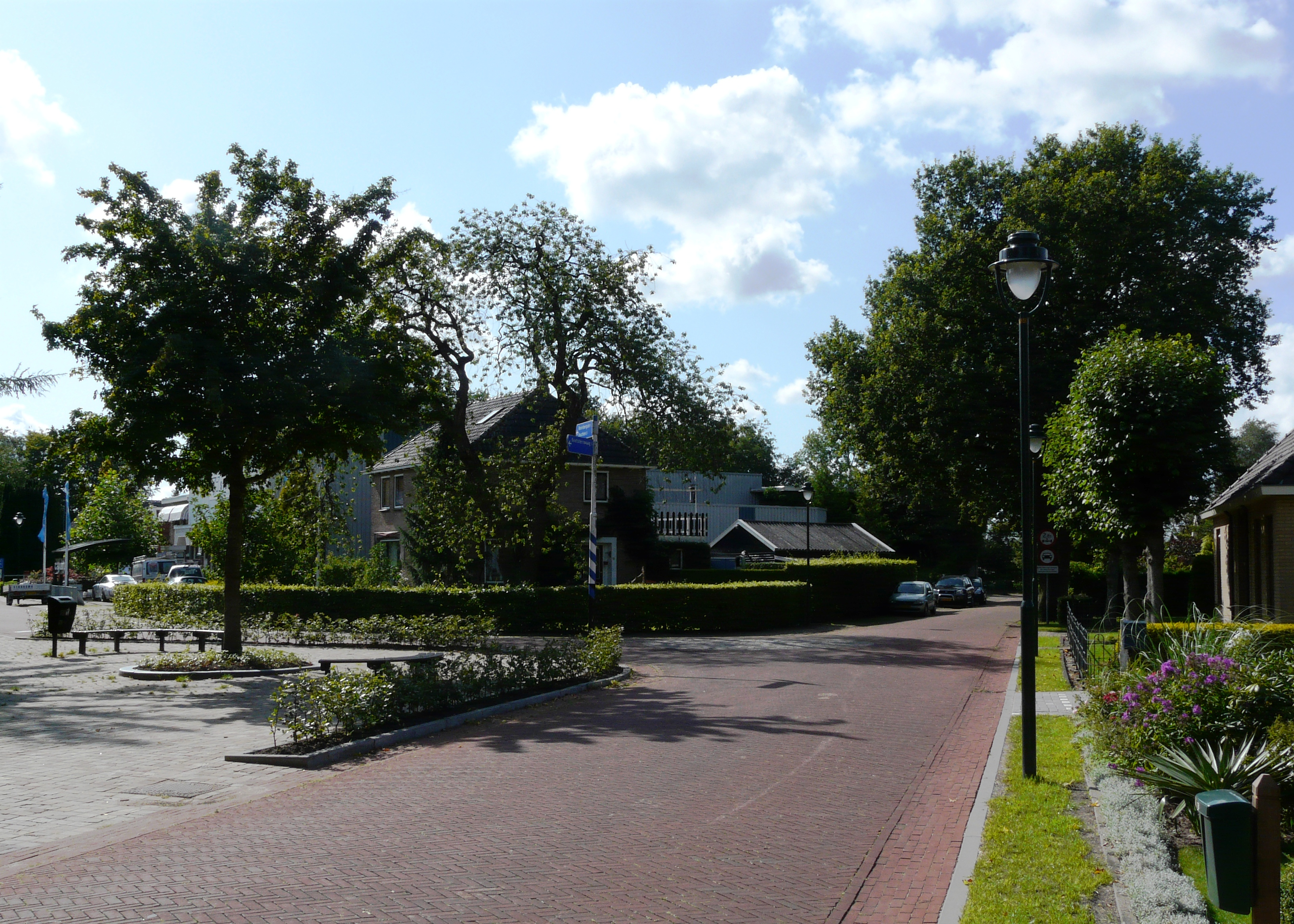 Buorskip de Galhoeke by Koartehimmen